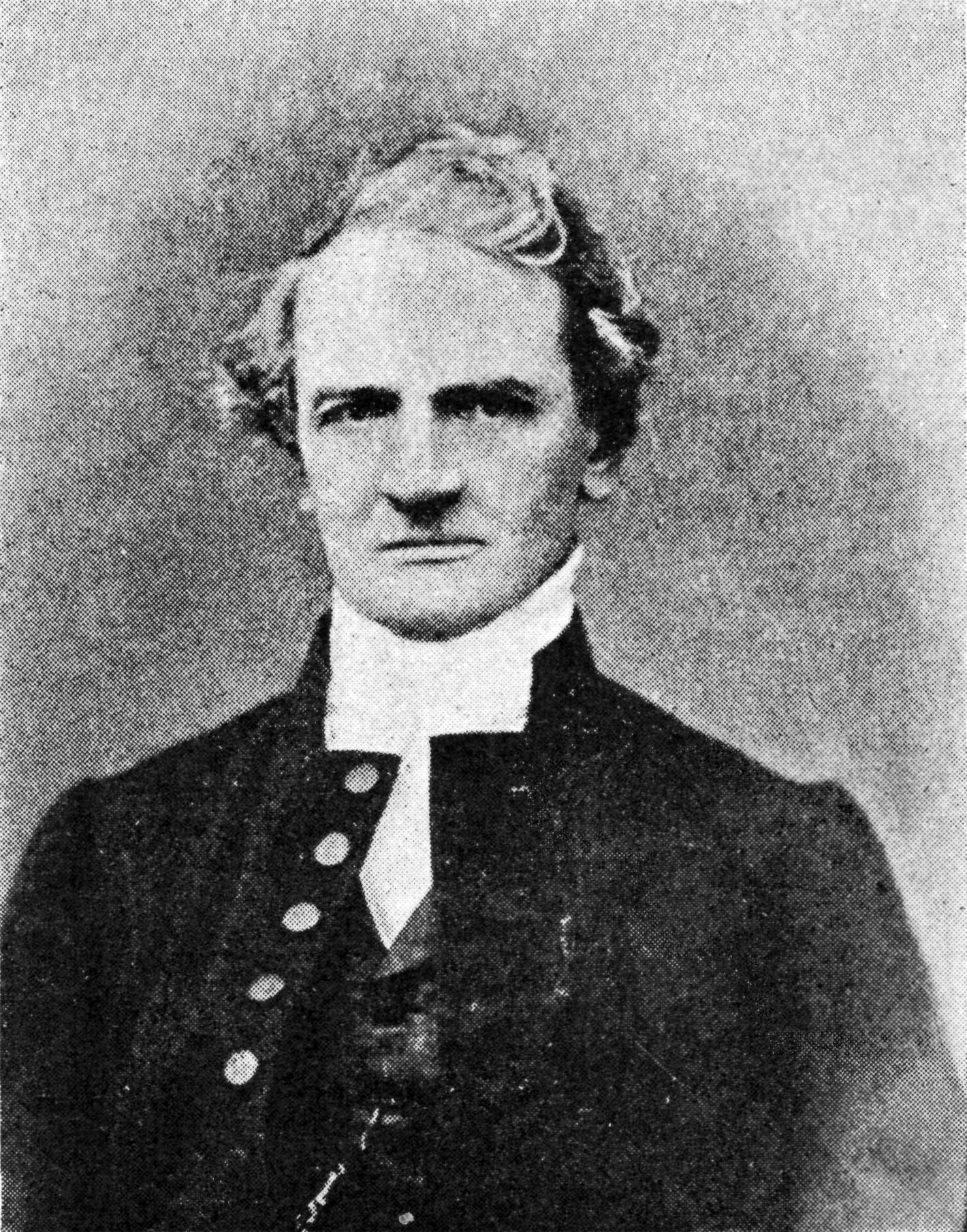 Bengt Olof Lille (1807-75).